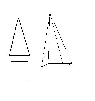 Exemplo de Faces, com a Pirâmide de Base Quadrada. Ao lado da pirâmide vemos as faces que se encontram nela.